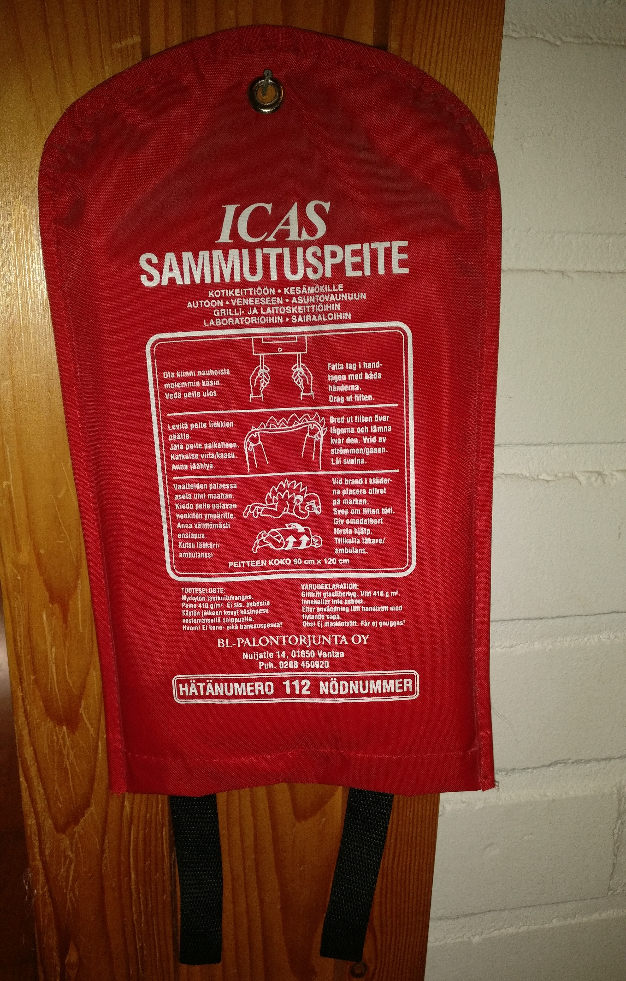 Alkusammutukseen käytettävä sammutuspeite.